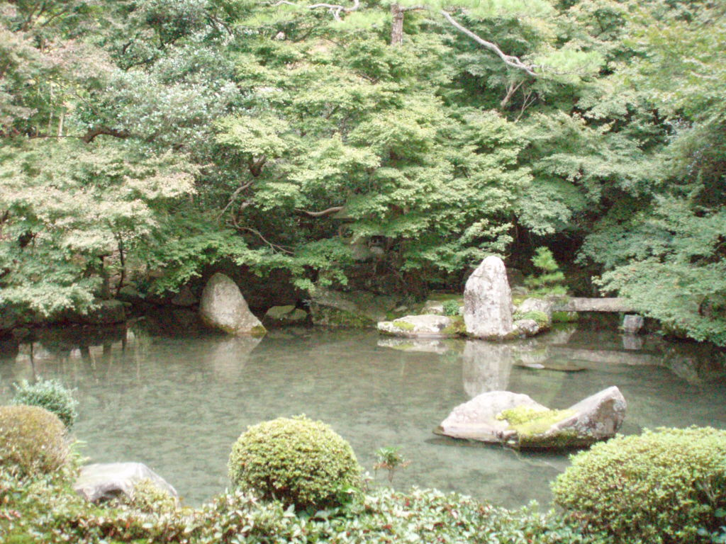 蓮華寺庭園の地泉 (Pond in Rengeji temple garden) .